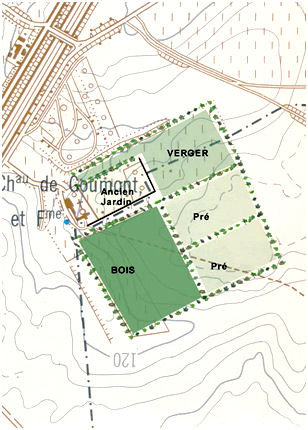 Plan de la ferme de Hougoumont en 1815 porté sur le plan actuel